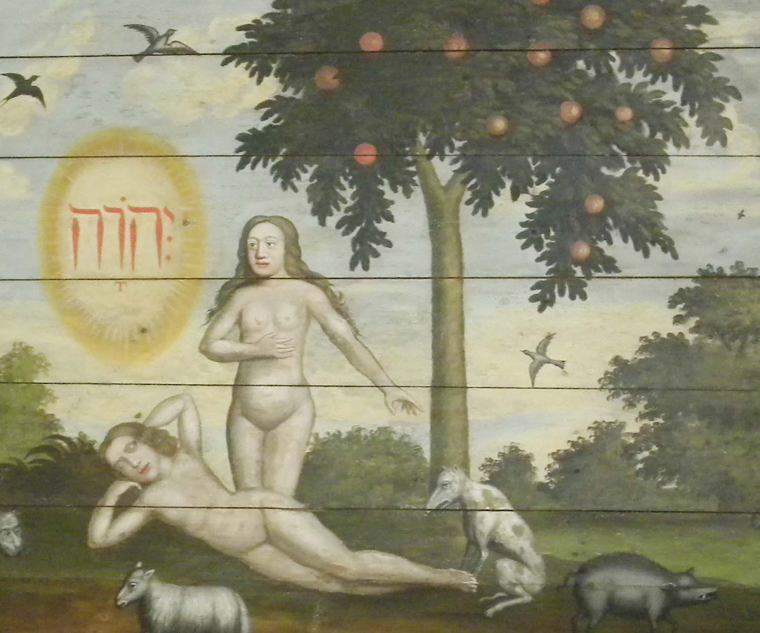 Takmålning från 1747 med gudsnamnet JHWH på hebreiska i Flistads kyrka